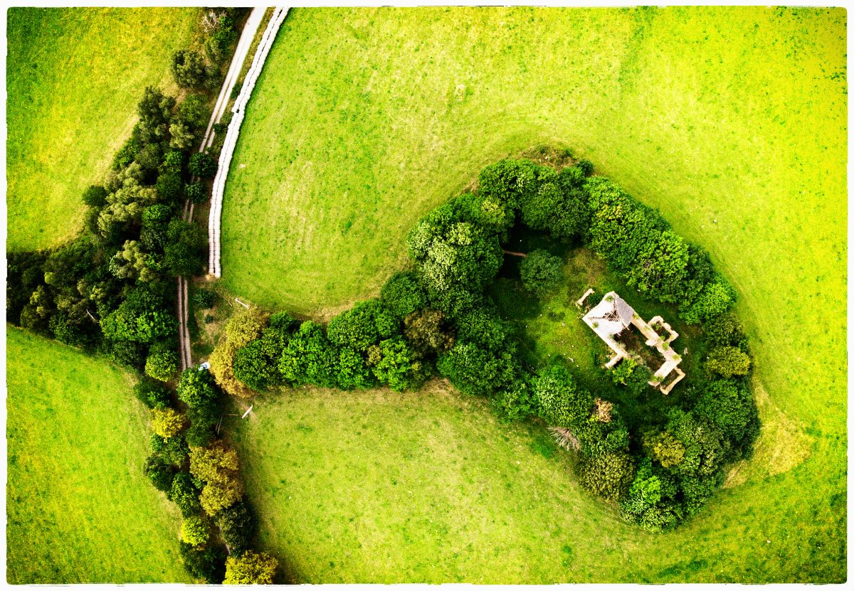 Poutní kostel svaté Anny, letecký snímek